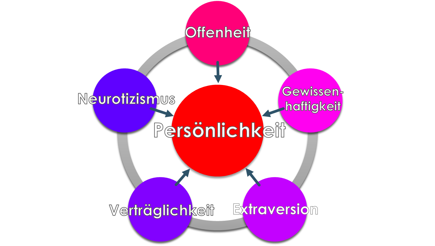 Fünf-Faktoren-Modell